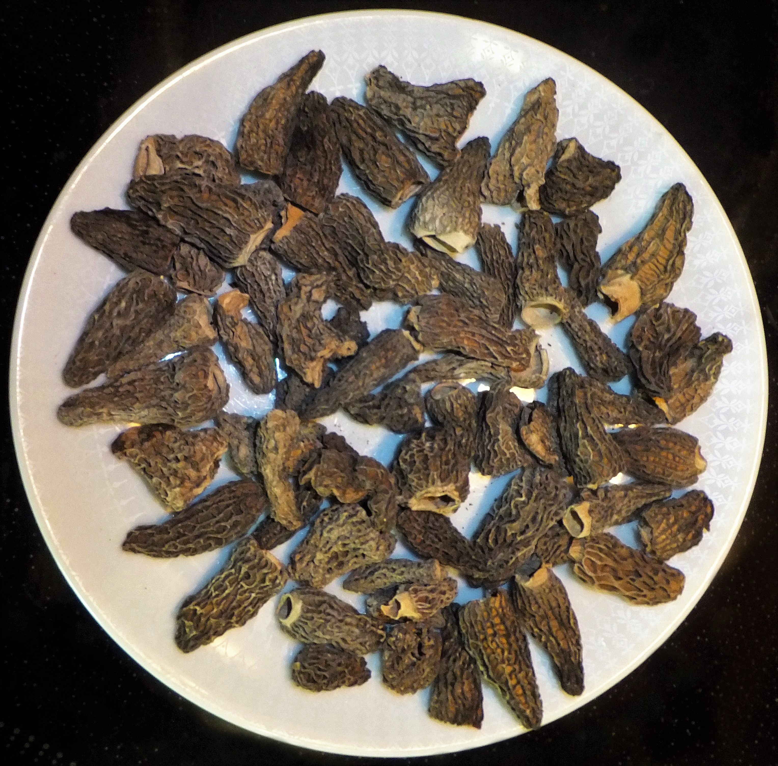 Morchella conica, getrocknet